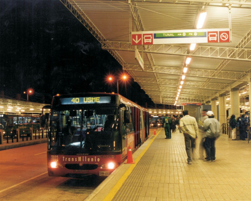 Bus de TransMilenio manejando el expreso 40 en el portal 80